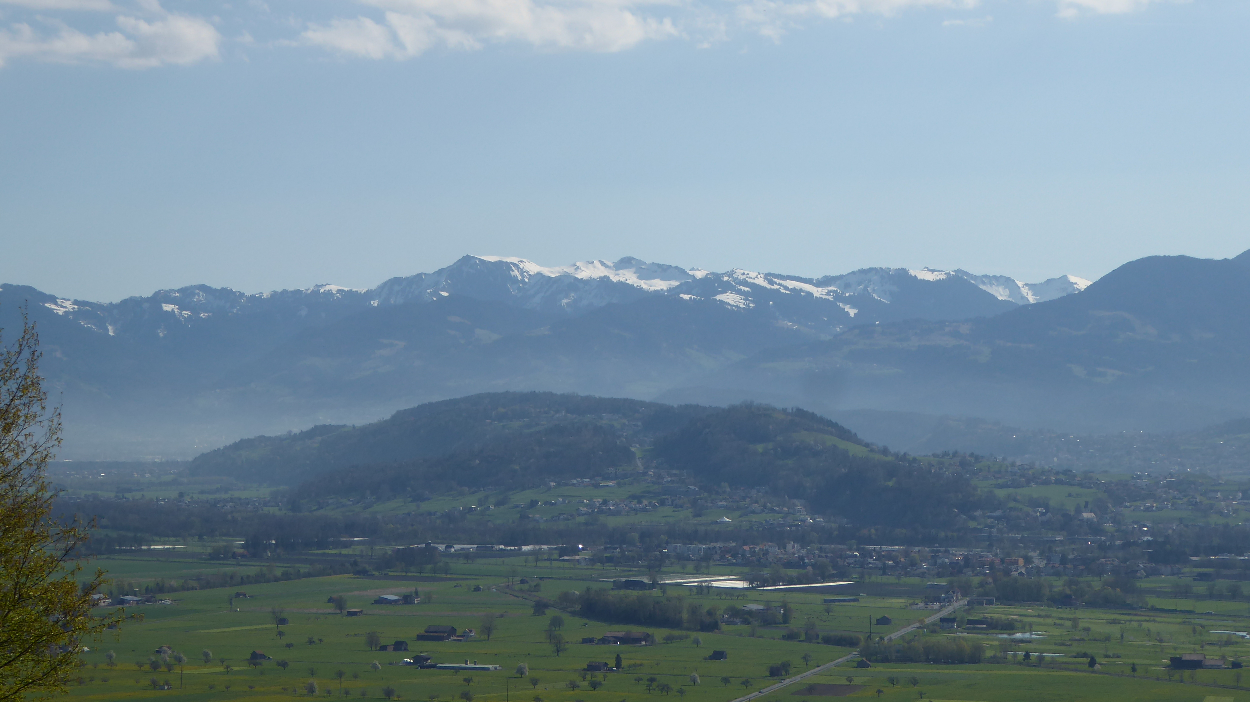 Blick vom Alten Zoll, Gams, auf den Eschnerberg; im Hintergrund Hoher Freschen